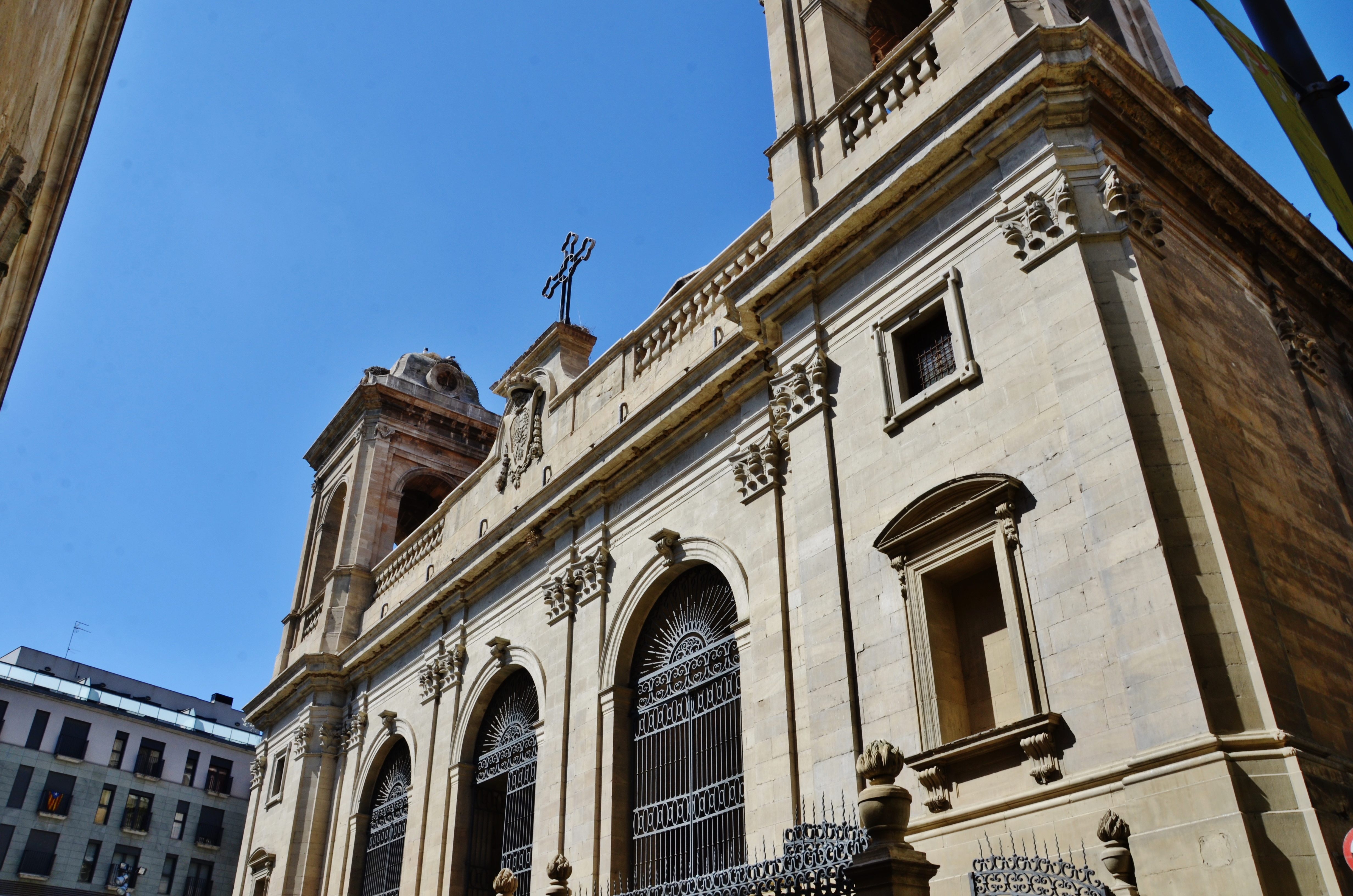 Seu Nova, o Catedral de l'Assumpció, Lleida